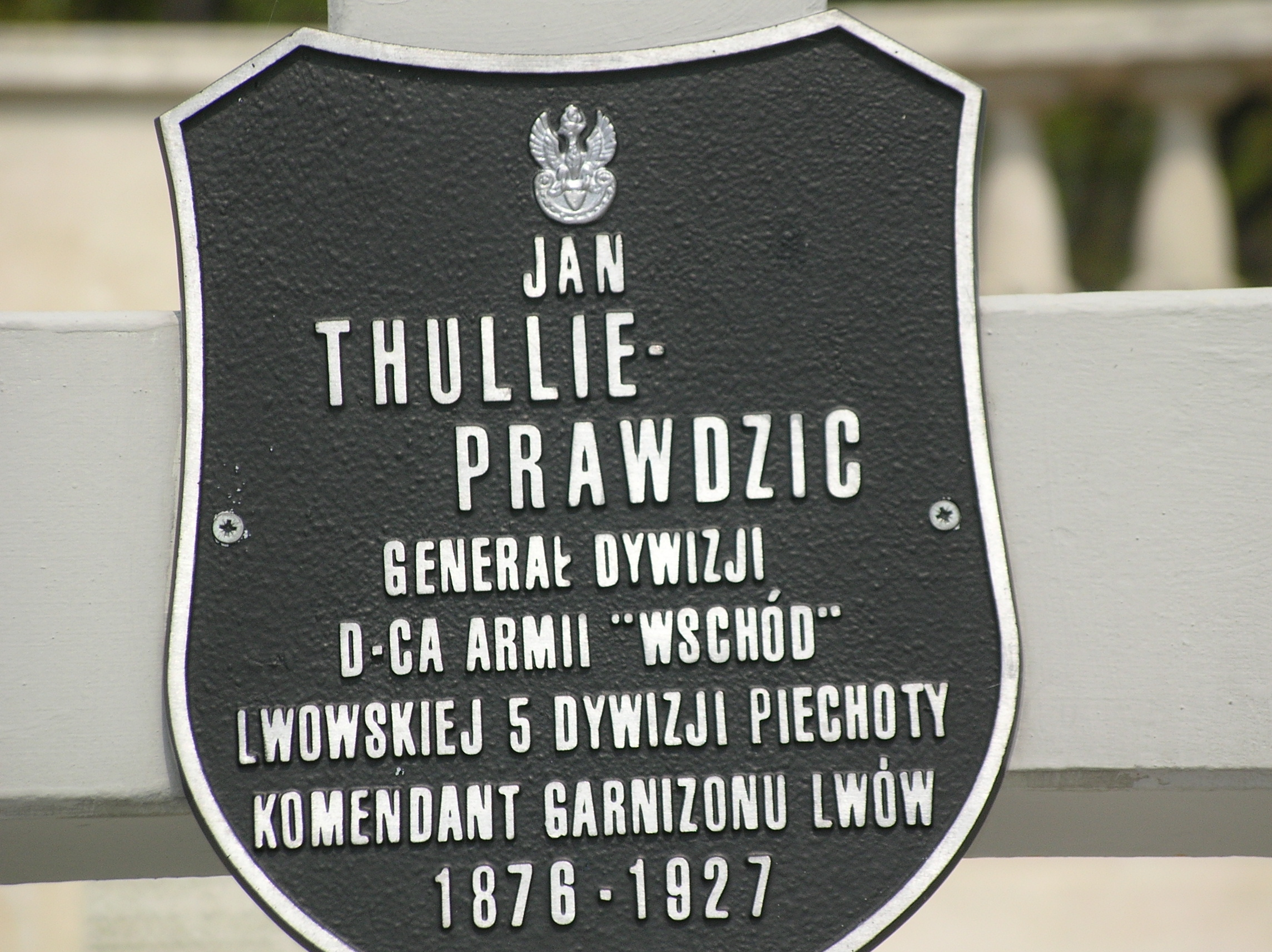 Jan Thulie